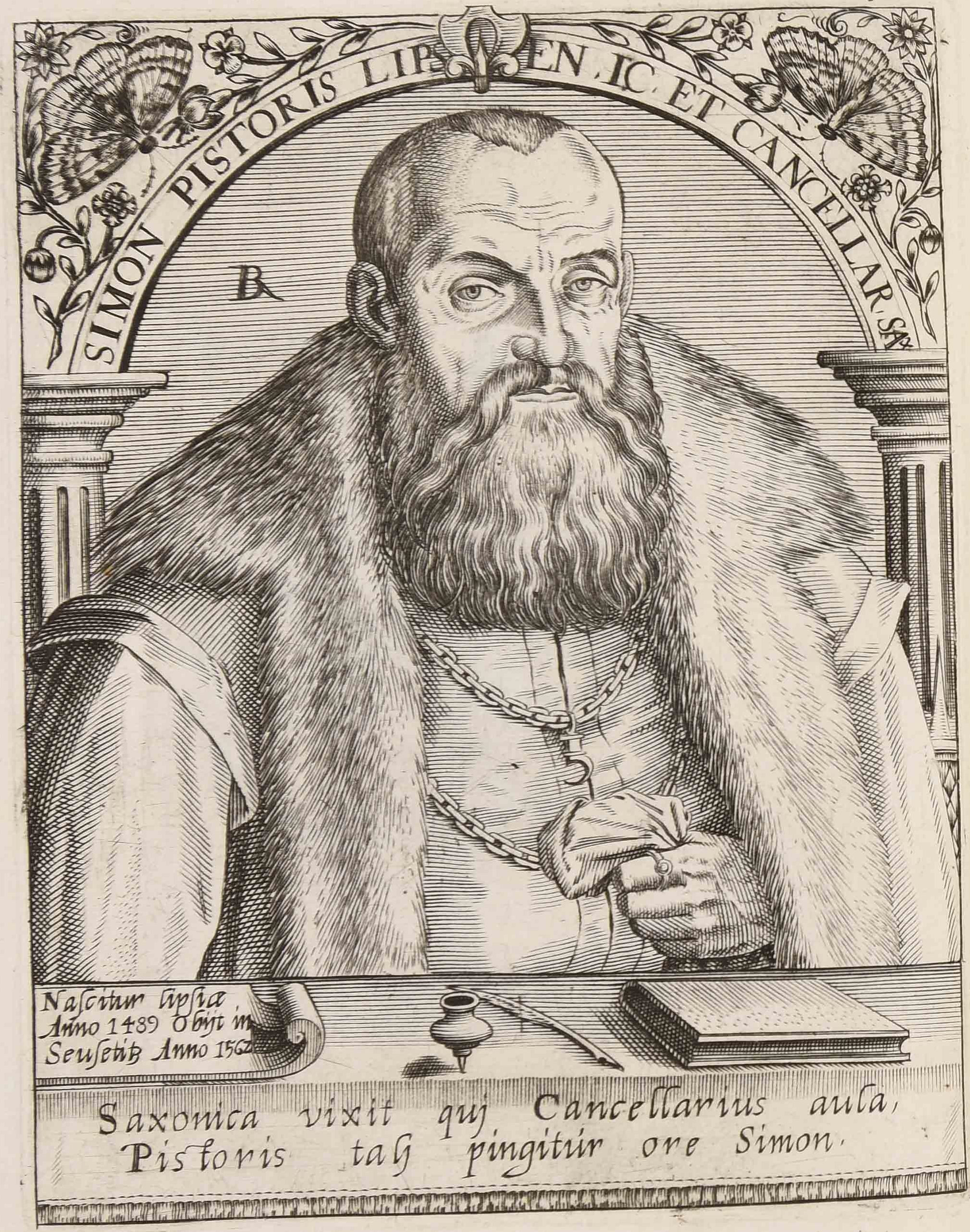 Calcografia in Jean Jacques Boissard, Bibliotheca sive Thesaurus virtutis, Frankfurt am Mein: William Fitzer 1627. Esemplare GI 1 v. c 41 della Biblioteca comunale di Trento, che presenta aggiunte successive.